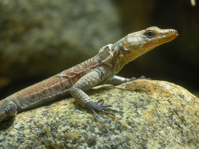 Selbst fotografiert. Aufgenommen mit einer Nikon Coolpix 5700 im Zoo Frankfurt. Fotograf/Quelle: Wilfried Berns / Motiv: Pungwe Plattechse (Platysaurus pungweensis)